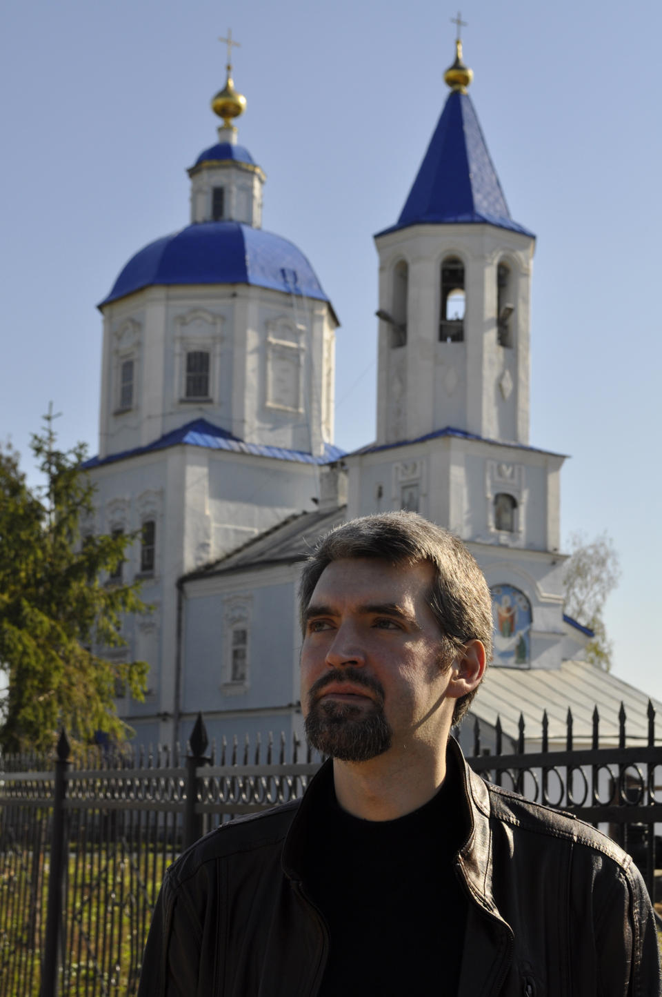 Диакон Сергий Баранов